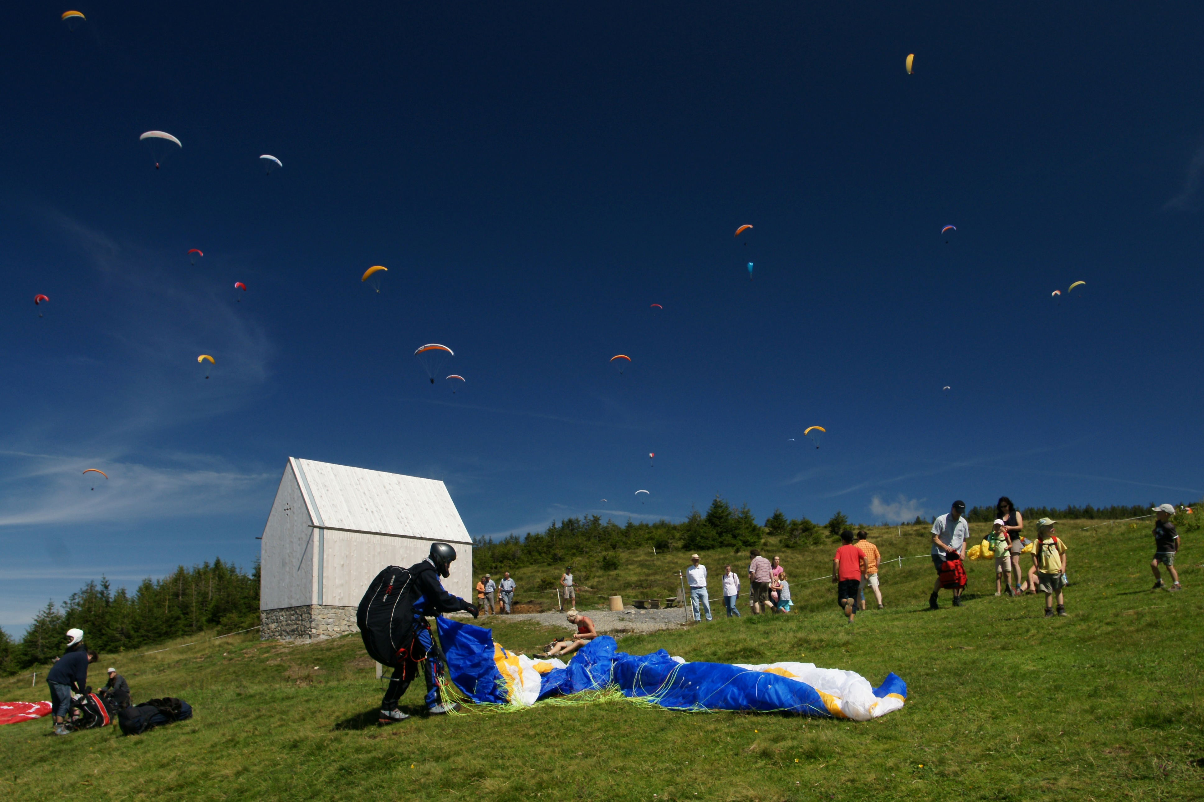 Paragliding auf der Niedere mit den Bergbahnen Andelsbuch in Vorarlberg. Im Hintergrund die “Kapelle Alpe Vordere Niedere” in Andelsbuch erbaut 2008 nach Plänen von cukrowicz nachbaur architekten zt gmbh.